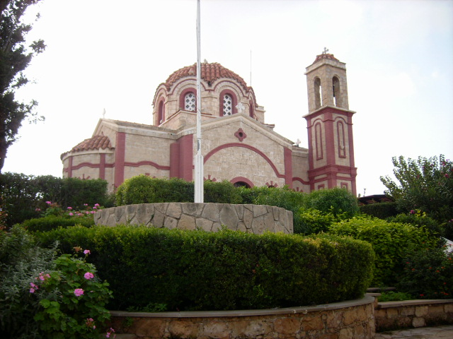 Agios Georgios